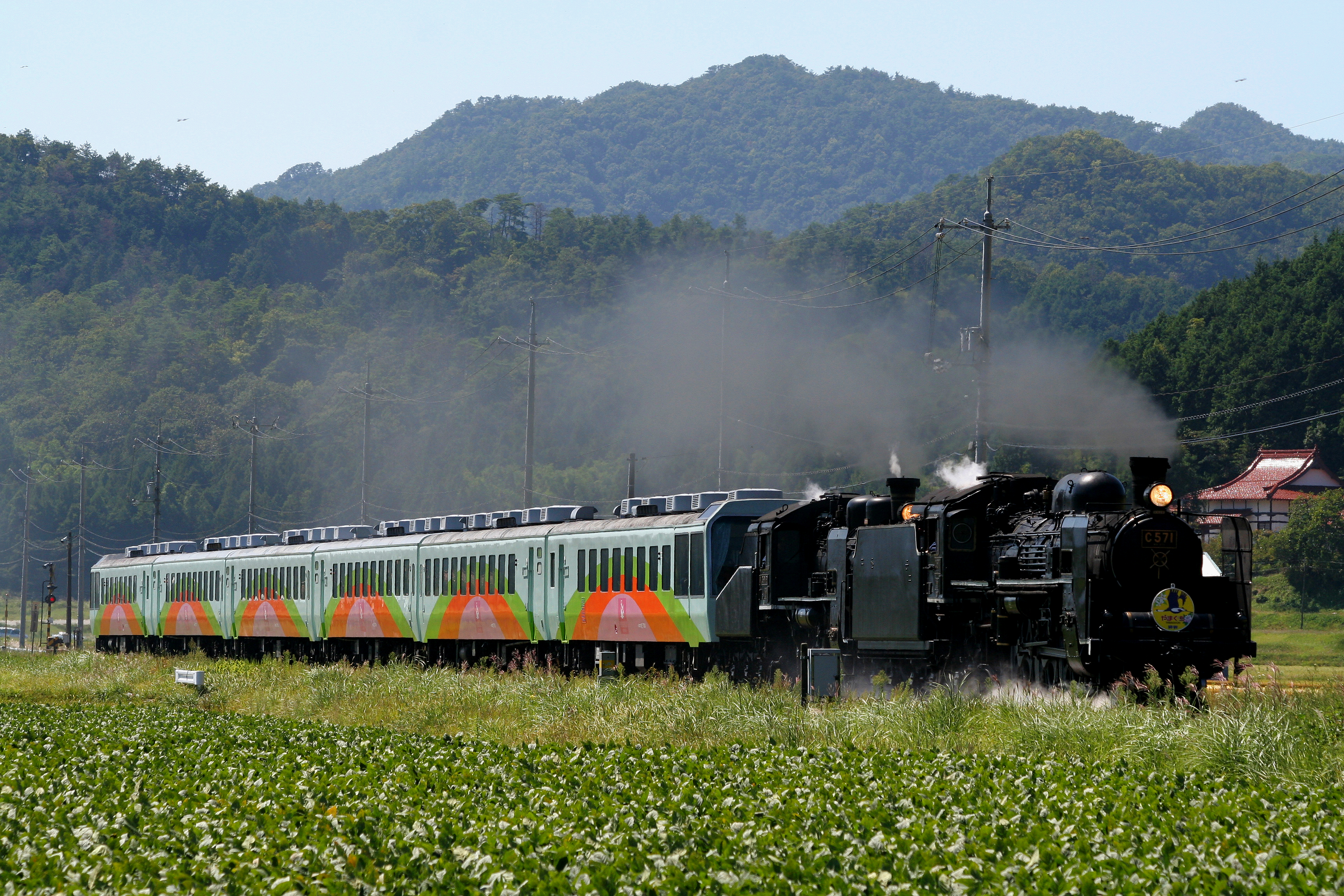 SLやまぐちゆうゆう号 山口線 徳佐-船平山（直線区間） C57＋C56＋ユウユウサロン岡山6両